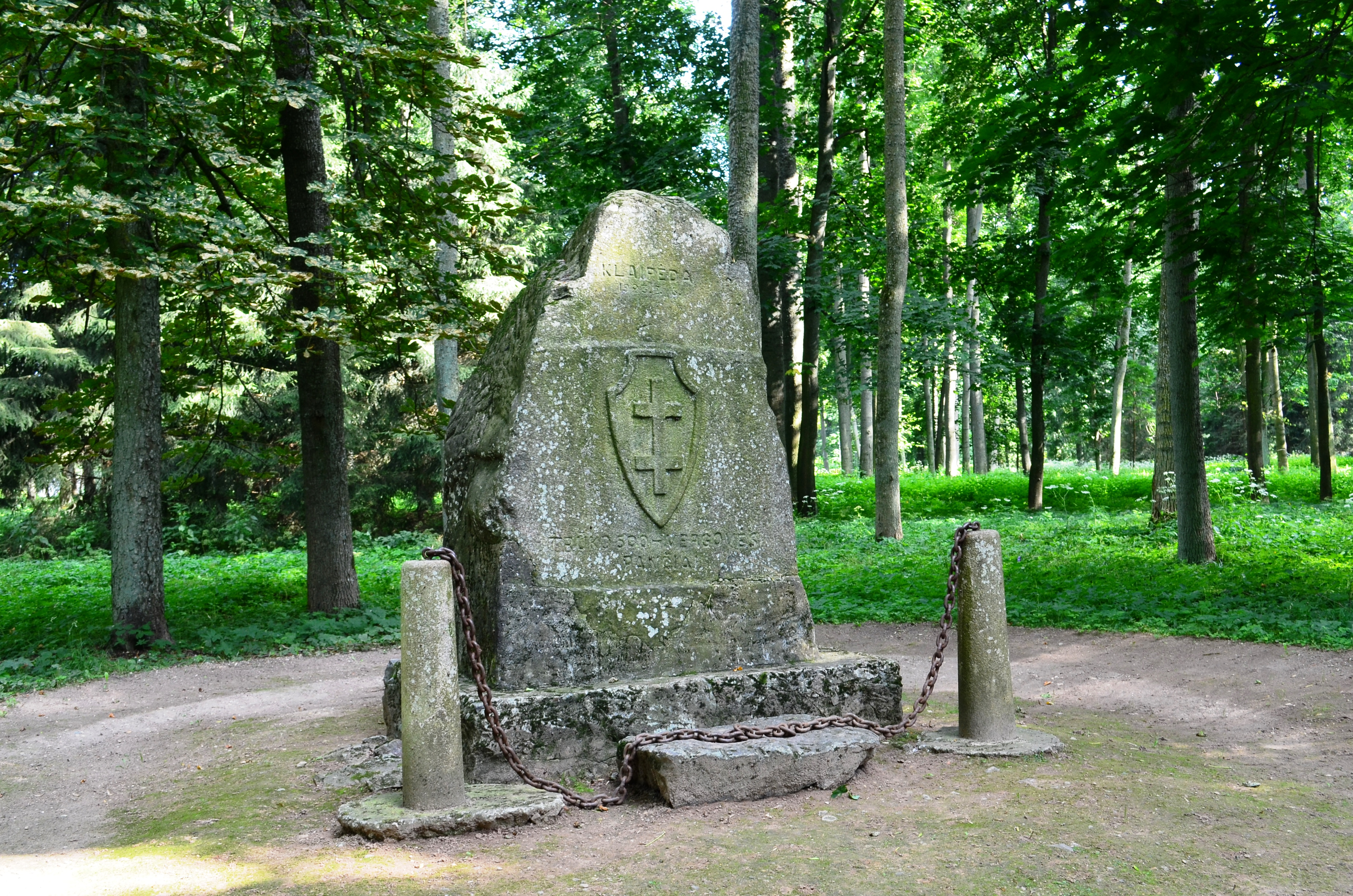 Paminklas nepriklausomybei, 1923 m., Akademijos parkas, Akademija, Kėdainių raj.